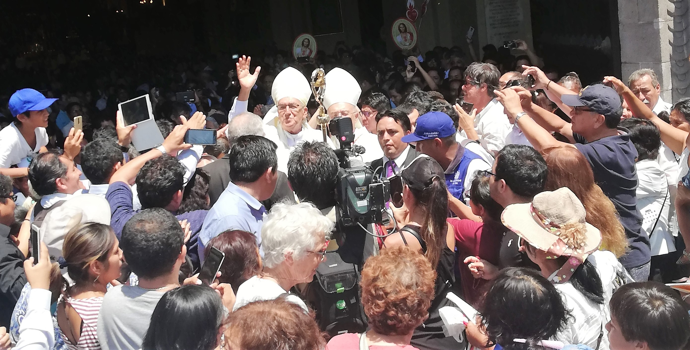 Toma de posesión como Arzobispo de Lima.